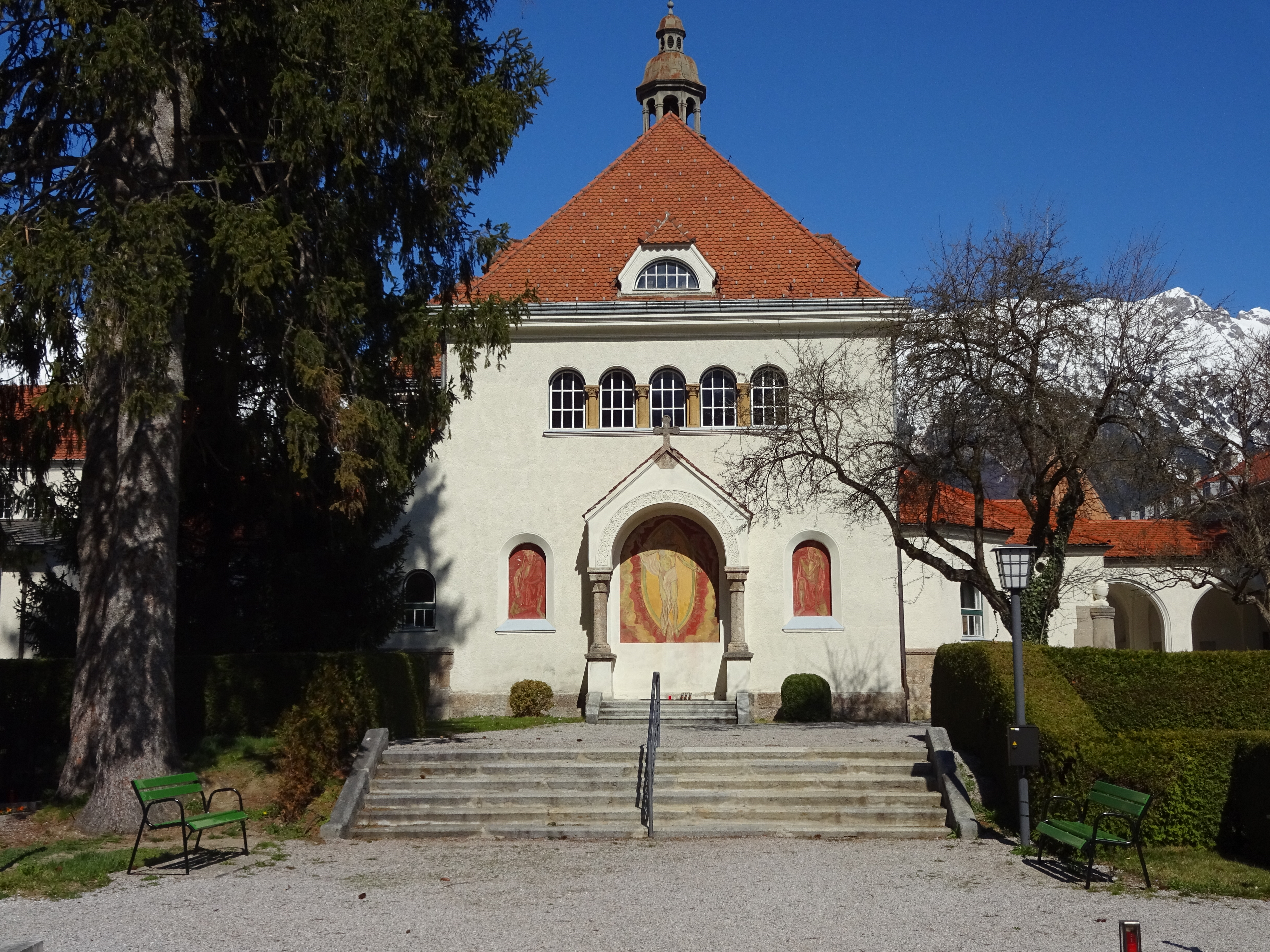 Ostfriedhof (Pradler Friedhof), Innsbruck: Kapelle von Süden This media shows the remarkable cultural object in the Austrian state of Tyrol listed by the Tyrolean Art Cadastre with the ID 72804. (on tirisMaps, pdf, more images on Commons, Wikidata)